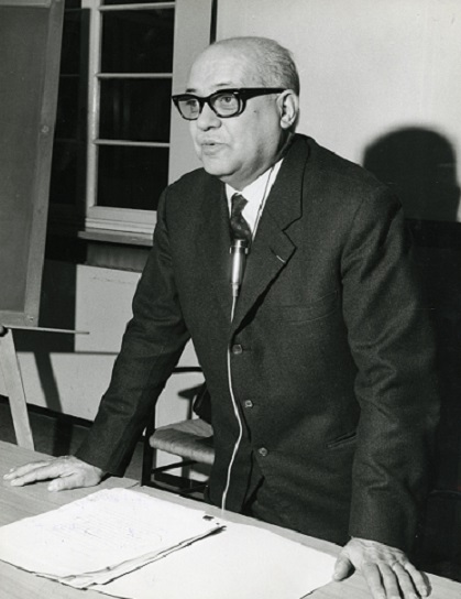 Michele Arslan